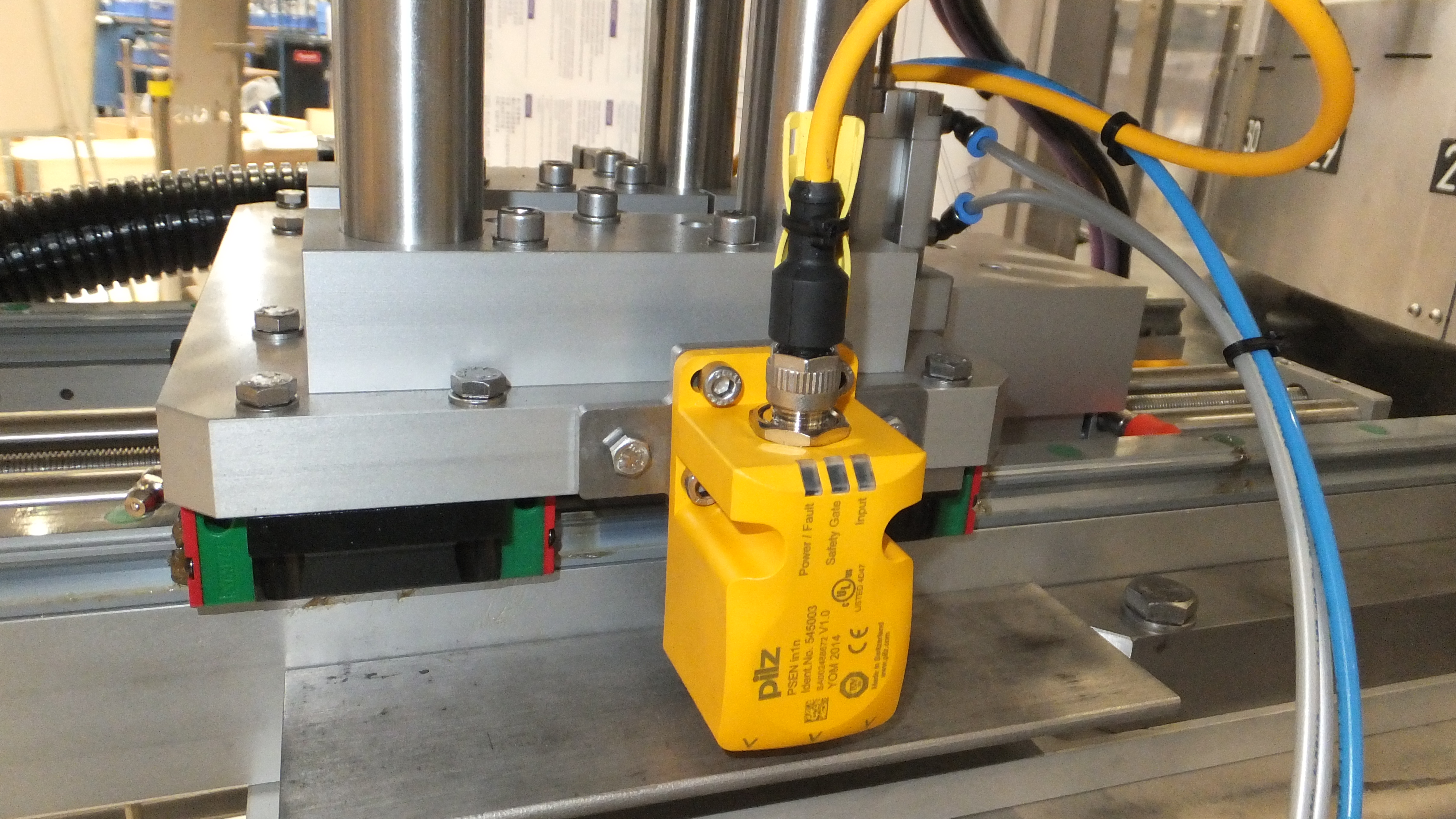 Schaltermodul zur Sicherheitssteuerung an einer Maschine